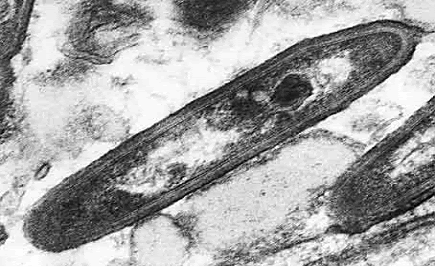 Ուիպլի հիվանդության հարուցիչը։